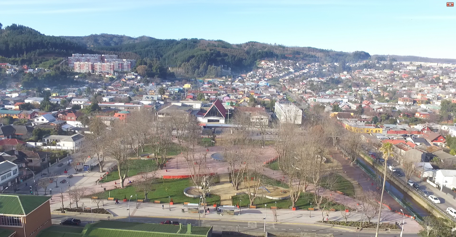 Vista aéres del centro de Penco y de la Plaza Los Conquistadores